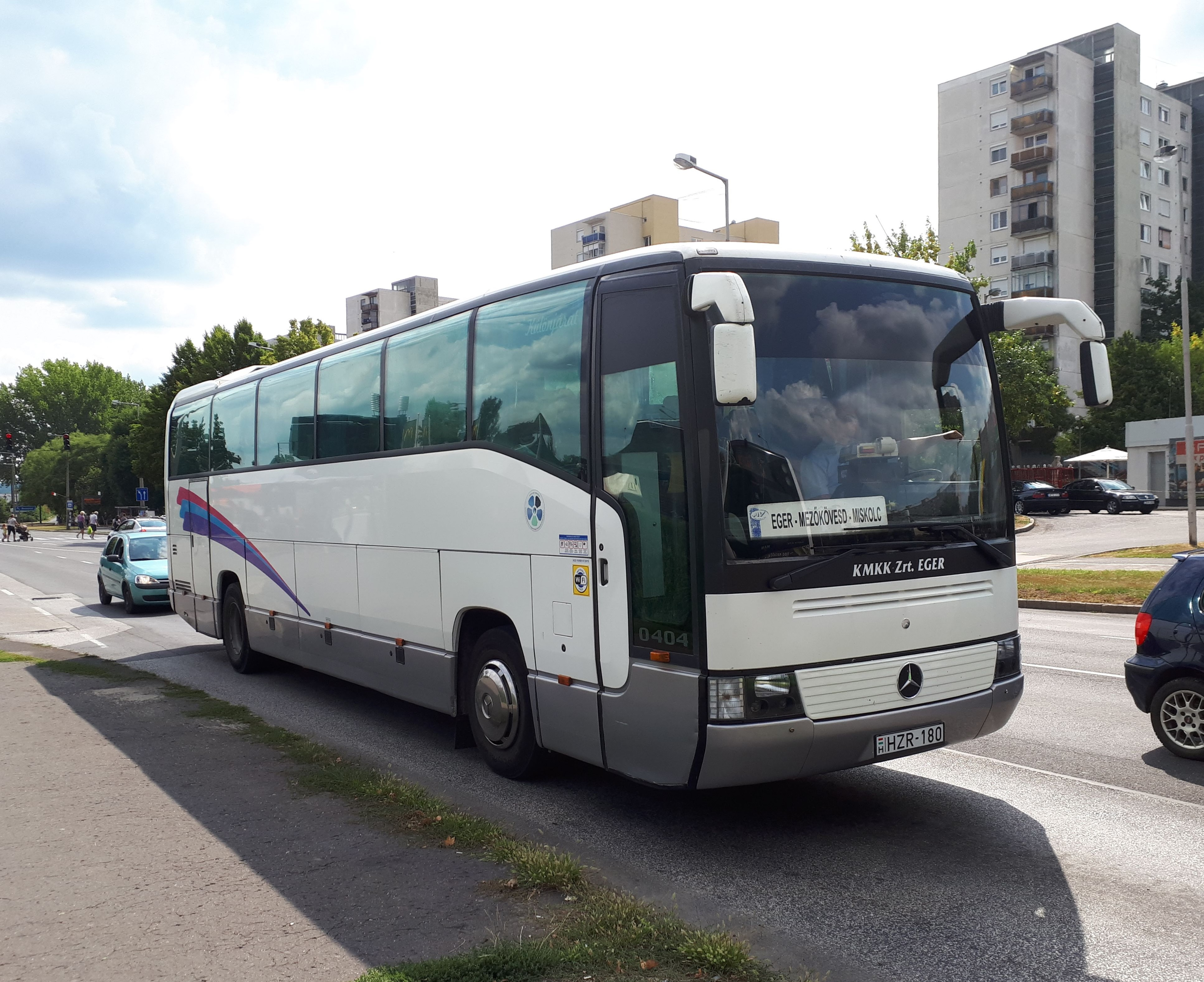 A KMKK HZR-180 rendszámú Mercedes-Benz O404-15RHD típusú busza Miskolcon, a 1380-as helyközi járaton.